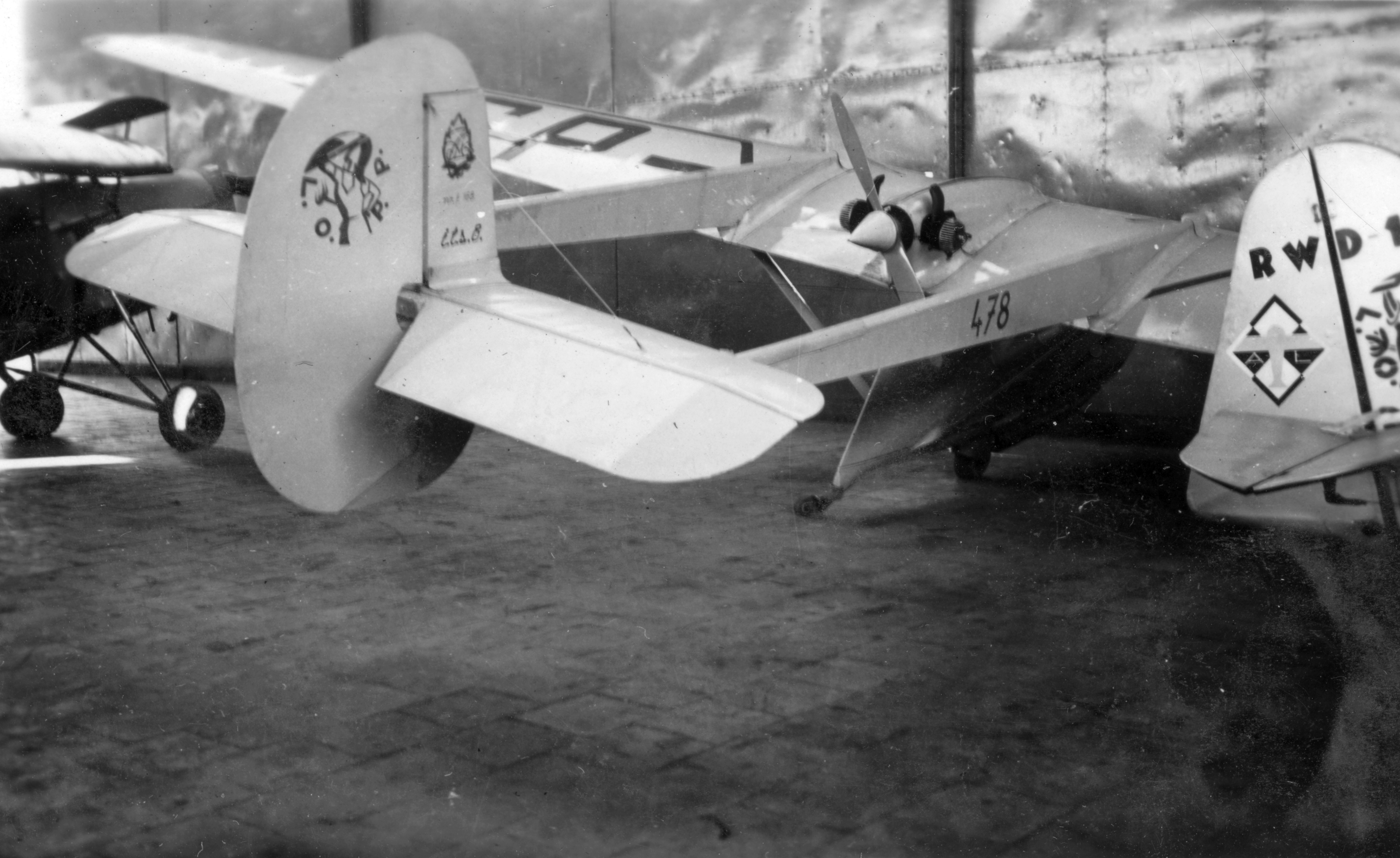 Wieslaw Stepniewski ITS-8 típusú segédmotoros vitorlázó repülőgépe. Location: Poland Tags: Polish brand, hangar, airport, sailplane Title: Wieslaw Stepniewski ITS-8 típusú segédmotoros vitorlázó repülőgépe.